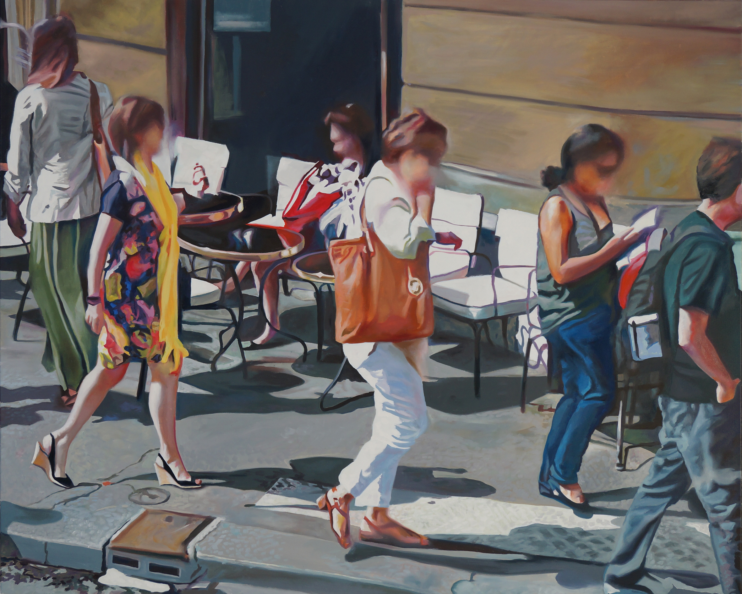 Werner Fohrer Streetview Avenue de l'Opéra, Paris 120x150 cm 2014